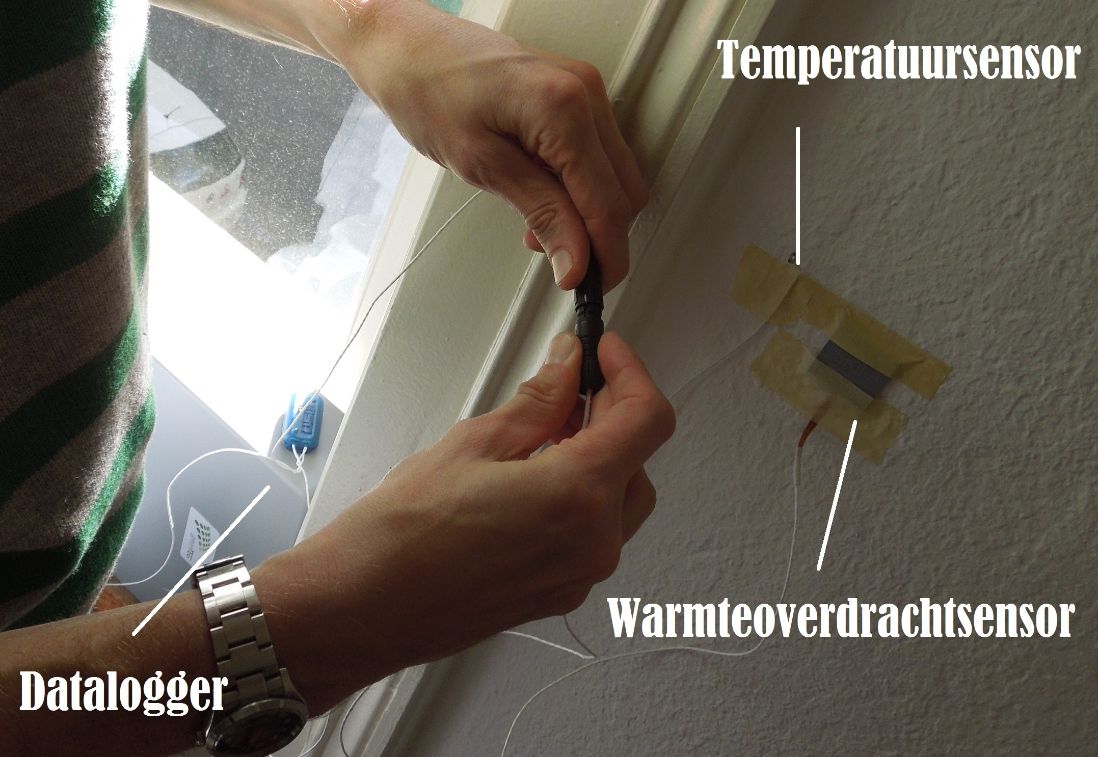 GreenTEG U-value KIT: meetopstelling